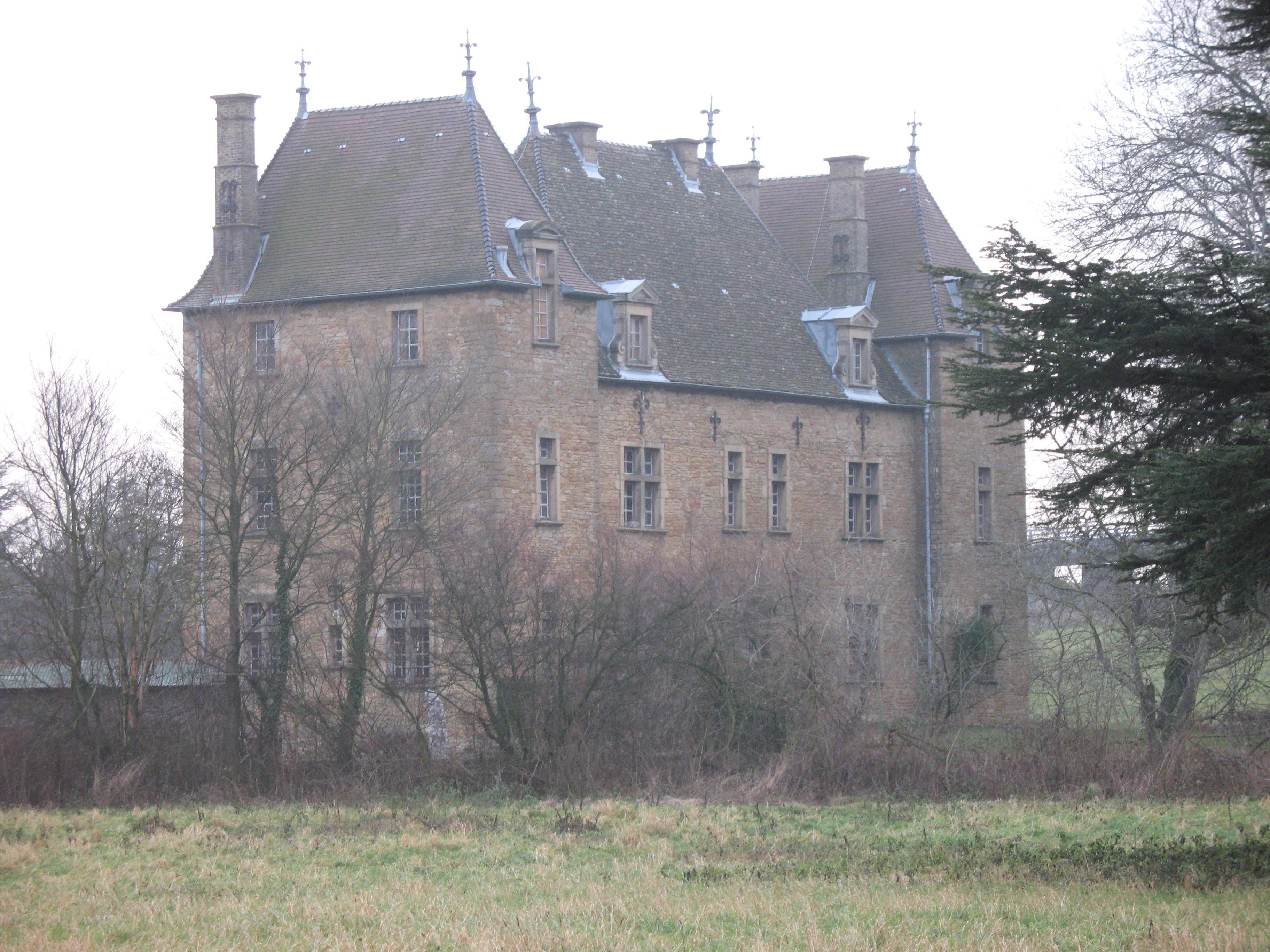 château de Beaulieu - Varennes-lès-Mâcon (Saône-et-Loire)